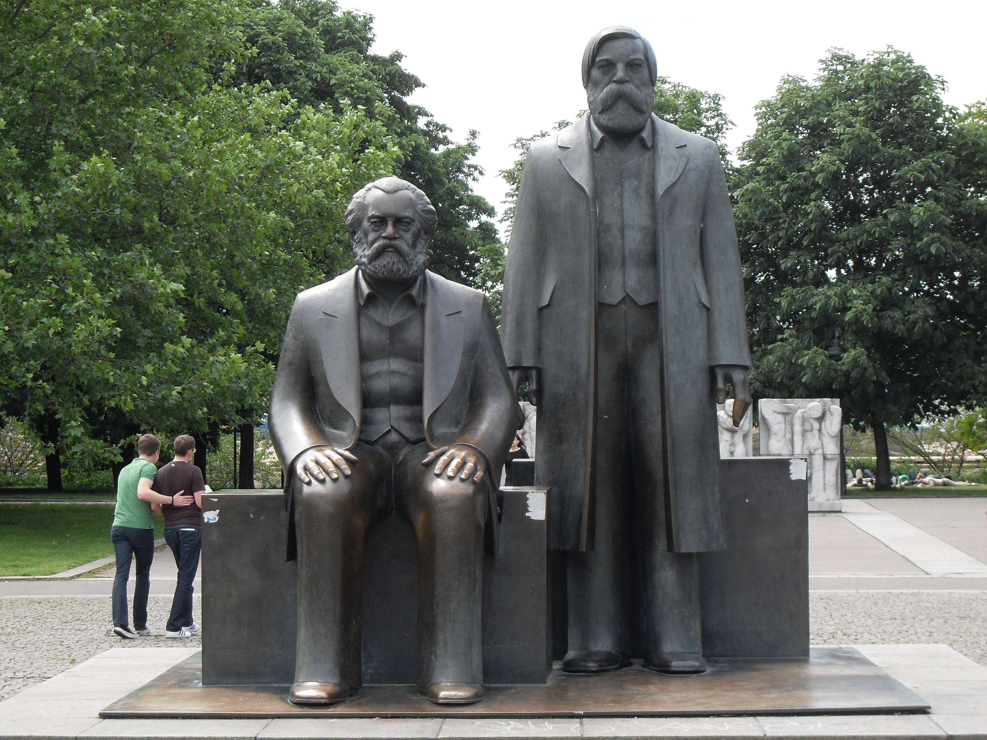 marx und Engels Denkmal, alter Platz